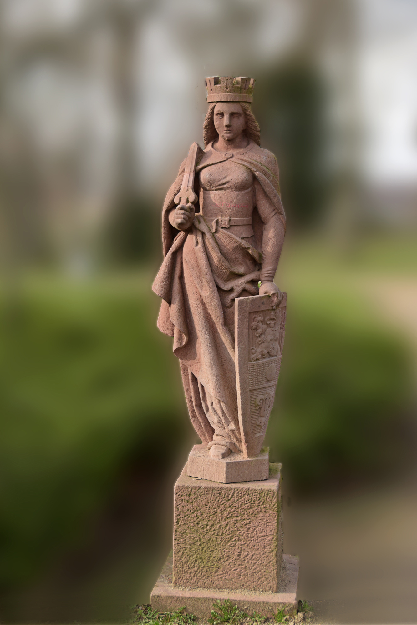 Kopie der Darmstadtia im Wolfskehl´schen Park, das Original befindet sich im Darmstadium (Kongresszentrum) in Darmstadt Details